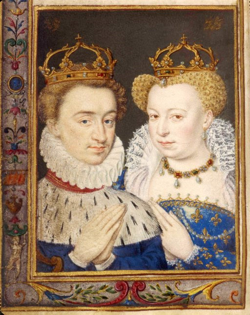 Miniatura estratta da un libro di preghiere di Caterina de' Medici, raffigurante Enrico III di Navarra e Margherita di Valois. In realtà, Margherita era meno grassa di come rappresentata in questa miniatura che si differenzia molto dalle raffigurazioni della "Regina Margot" dello stesso periodo.